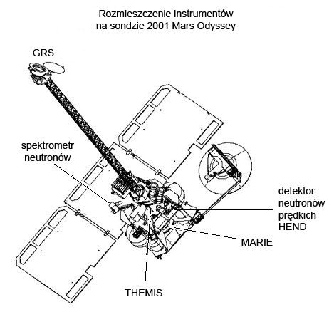 Rozkład instrumentów naukowych na sondzie 2001 Mars Odyssey.